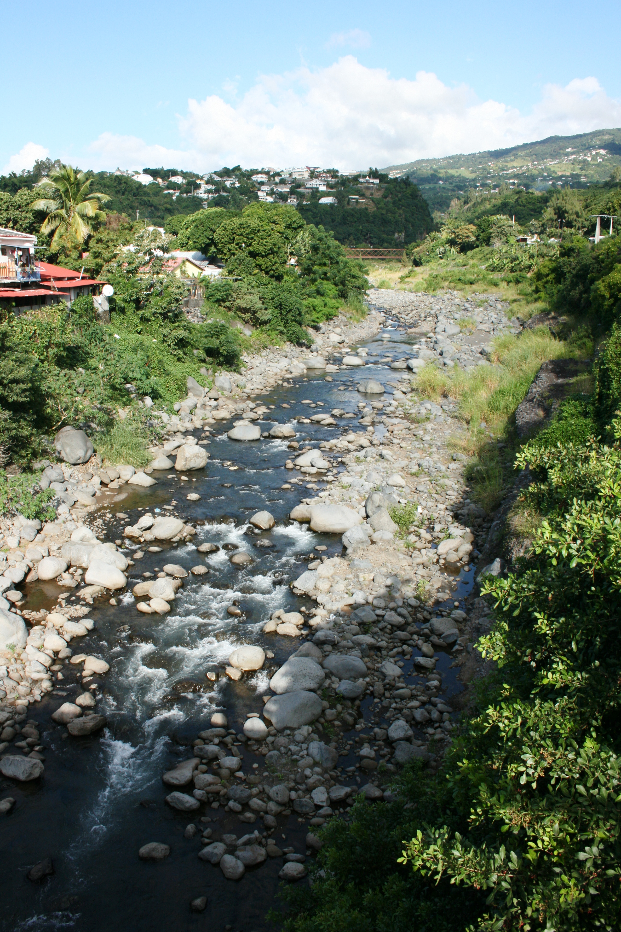 Vue de la Rivière des Pluies depuis le pont Desbassyns, à La Réunion.